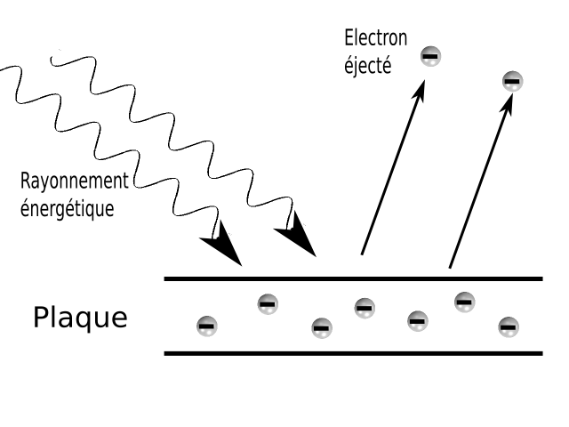 interprétation l'expérience de l'effet photoelectrique